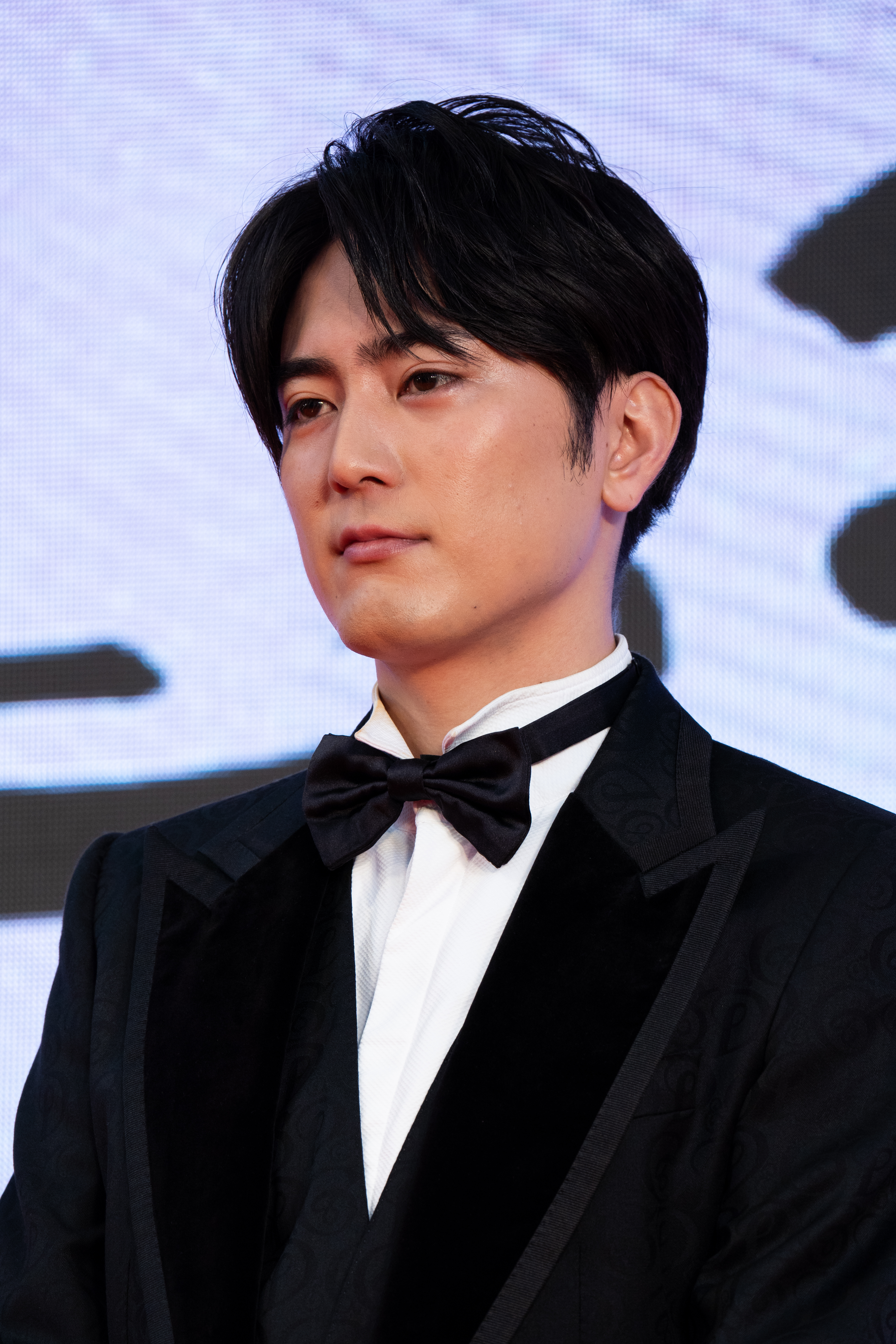 第32回 東京国際映画祭 オープニングセレモニー 間宮祥太朗 (殺さない彼と死なない彼女)